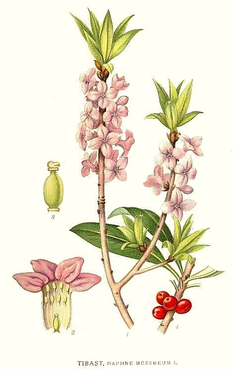 Original Description Tibast, Daphne mezereum L.